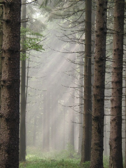 Thüringer Wald bei Oberhof. Foto: Thorsten Bührmann. Mit freundlicher Genehmigung des Fotografen. Bereitgestellt unter GNU-FDL